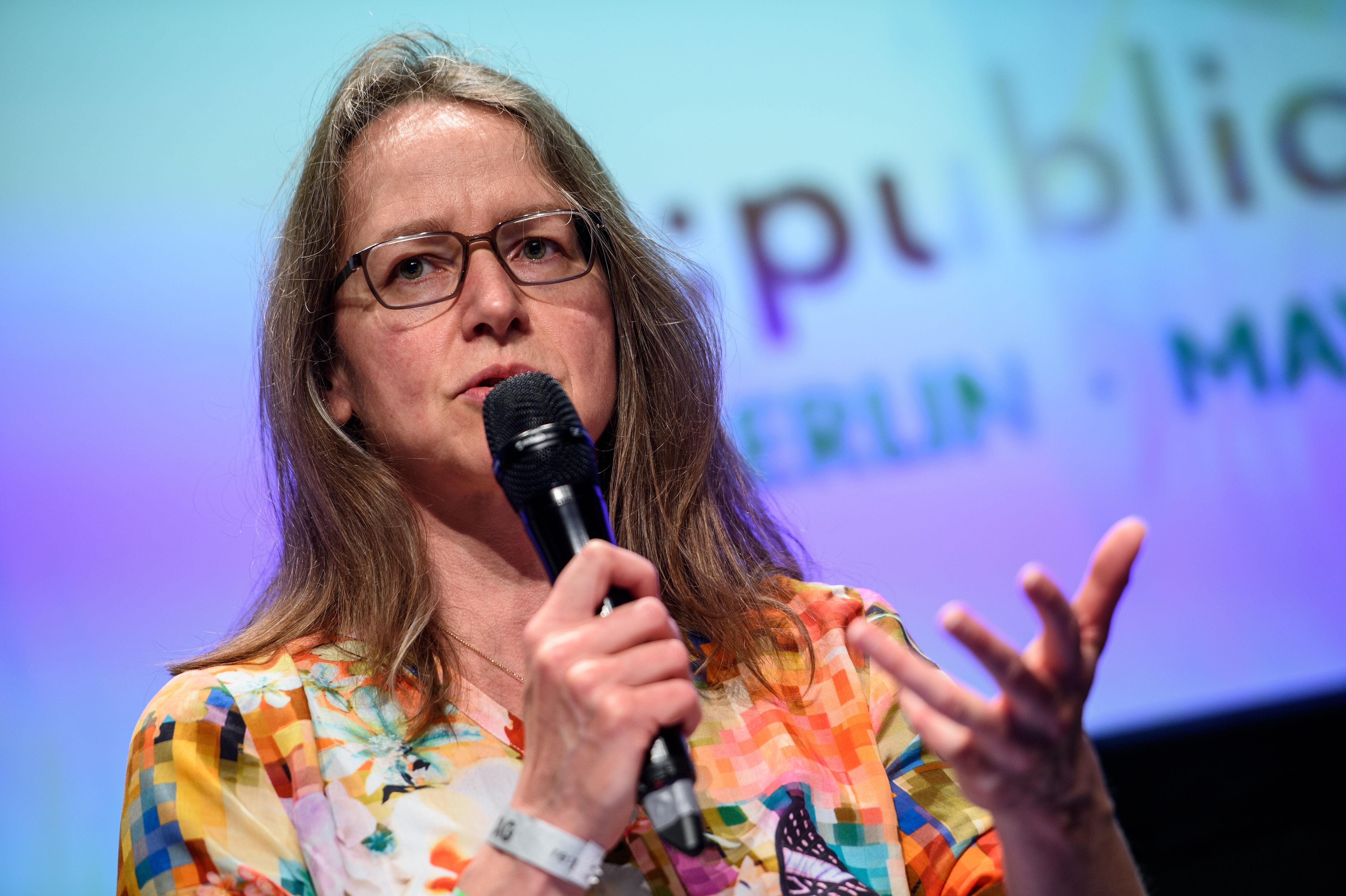 03.05.2018, Berlin: Talk: Künstliche Intelligenz, Algorithmen und die Arbeit von Morgen Speaker: Björn Böhning, John-Dylan Haynes, Kerstin Jürgens, Caterina Lobenstein Die re:publica ist eine der weltweit wichtigsten Konferenzen zu den Themen der digitalen Gesellschaft und findet in diesem Jahr vom 02. bis 04. Mai in der STATION-Berlin statt. Foto: Gregor Fischer/re:publica